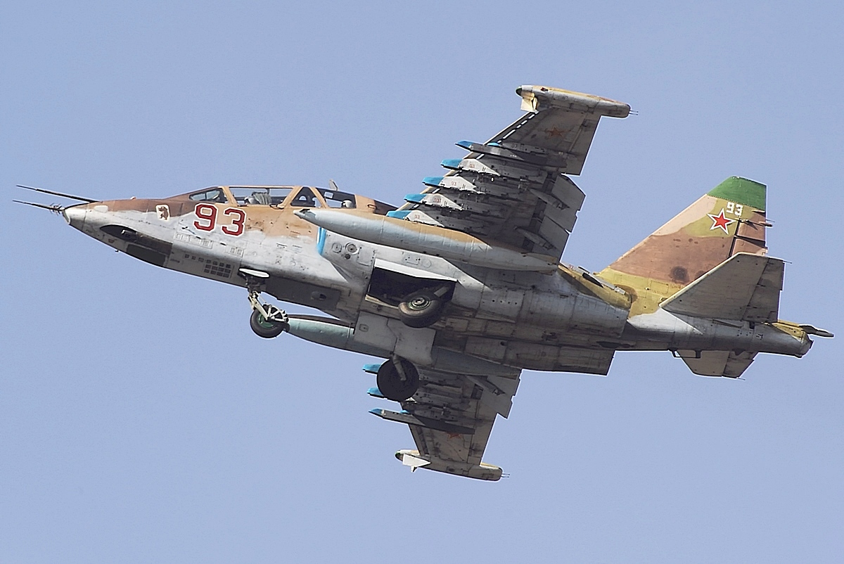 Su-25 93 red